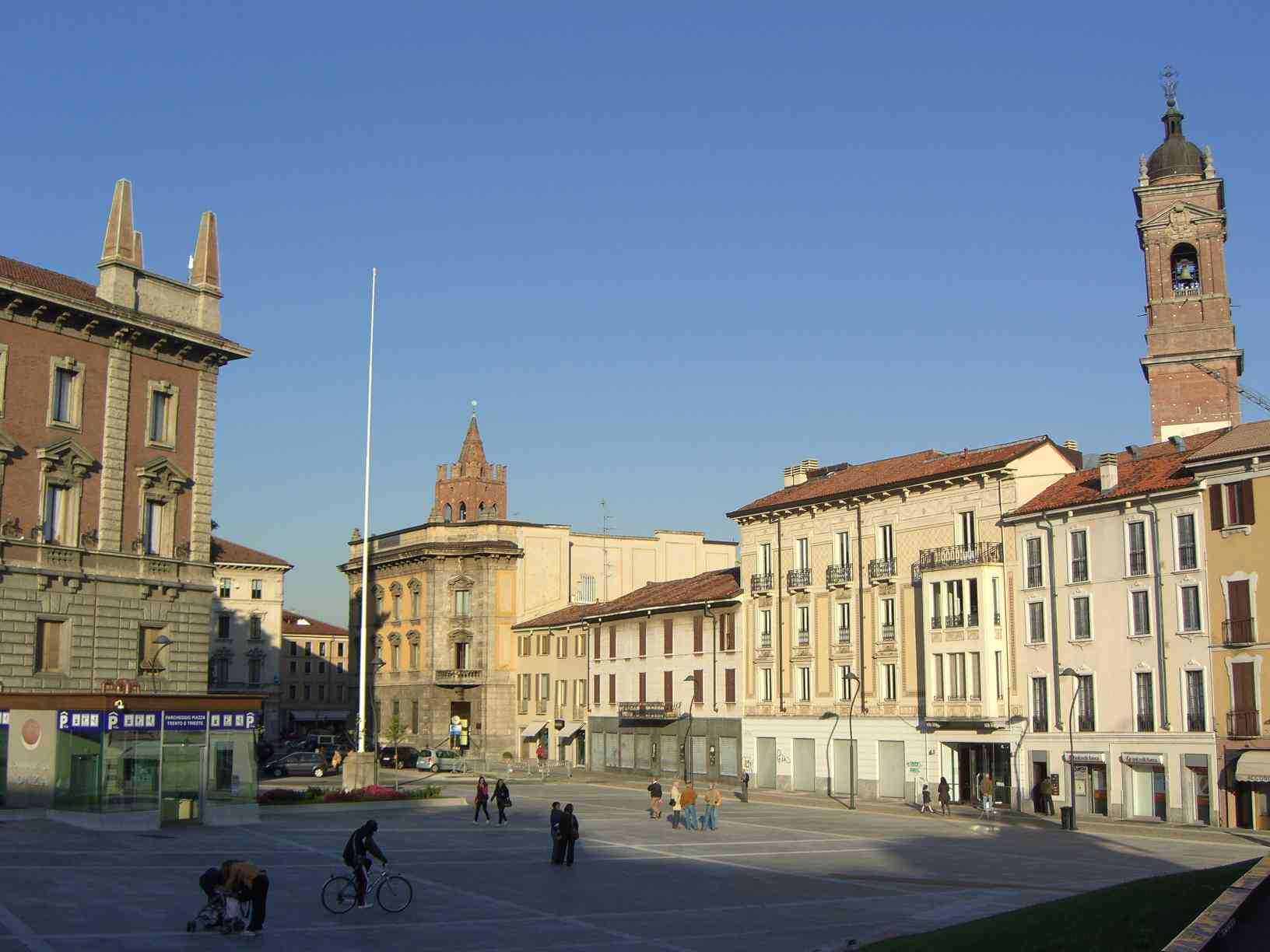 MB Monza piazza Trento e Trieste in fondo a destra si vede piazza Roma